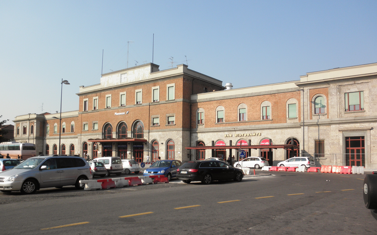 Il fabbricato viaggiatori della stazione di Piacenza